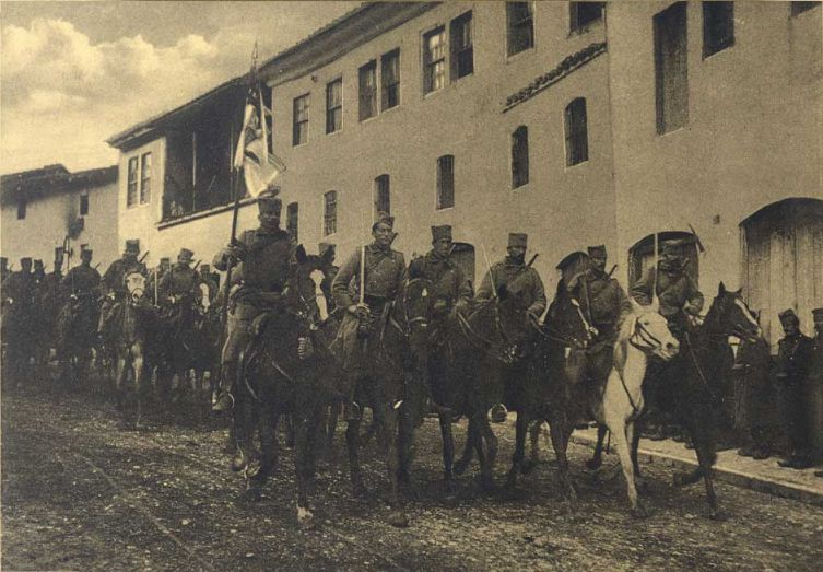 Улазак српске војске у Скопље.